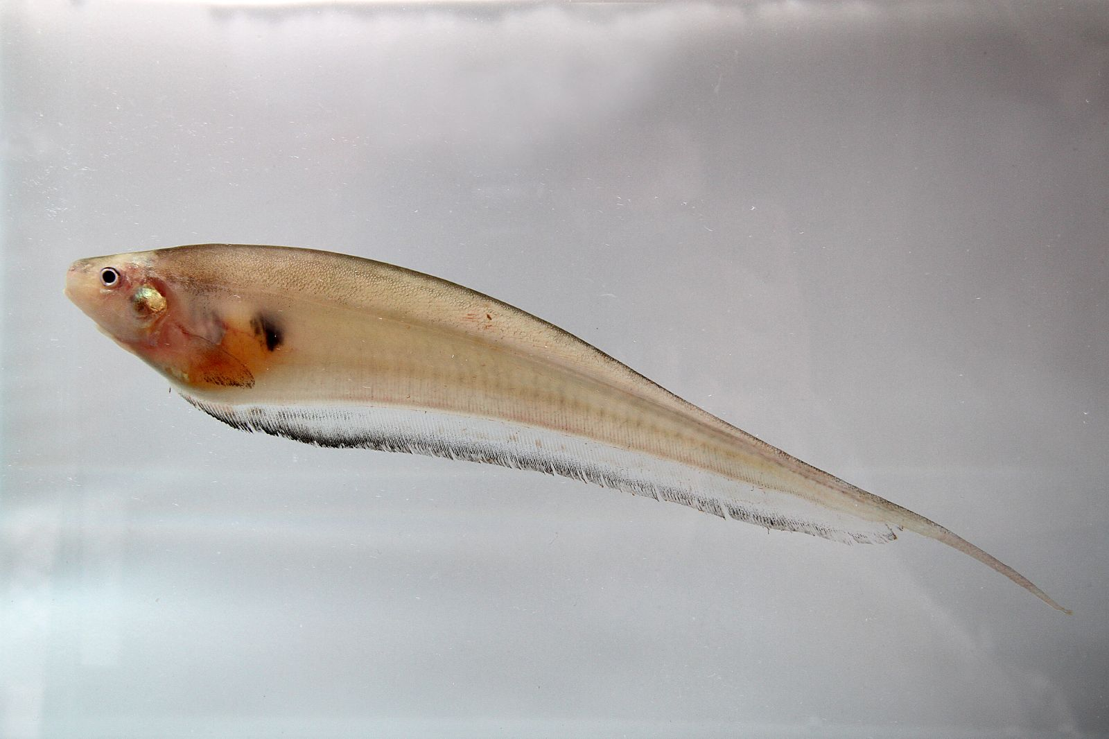 Eigenmannia sp.